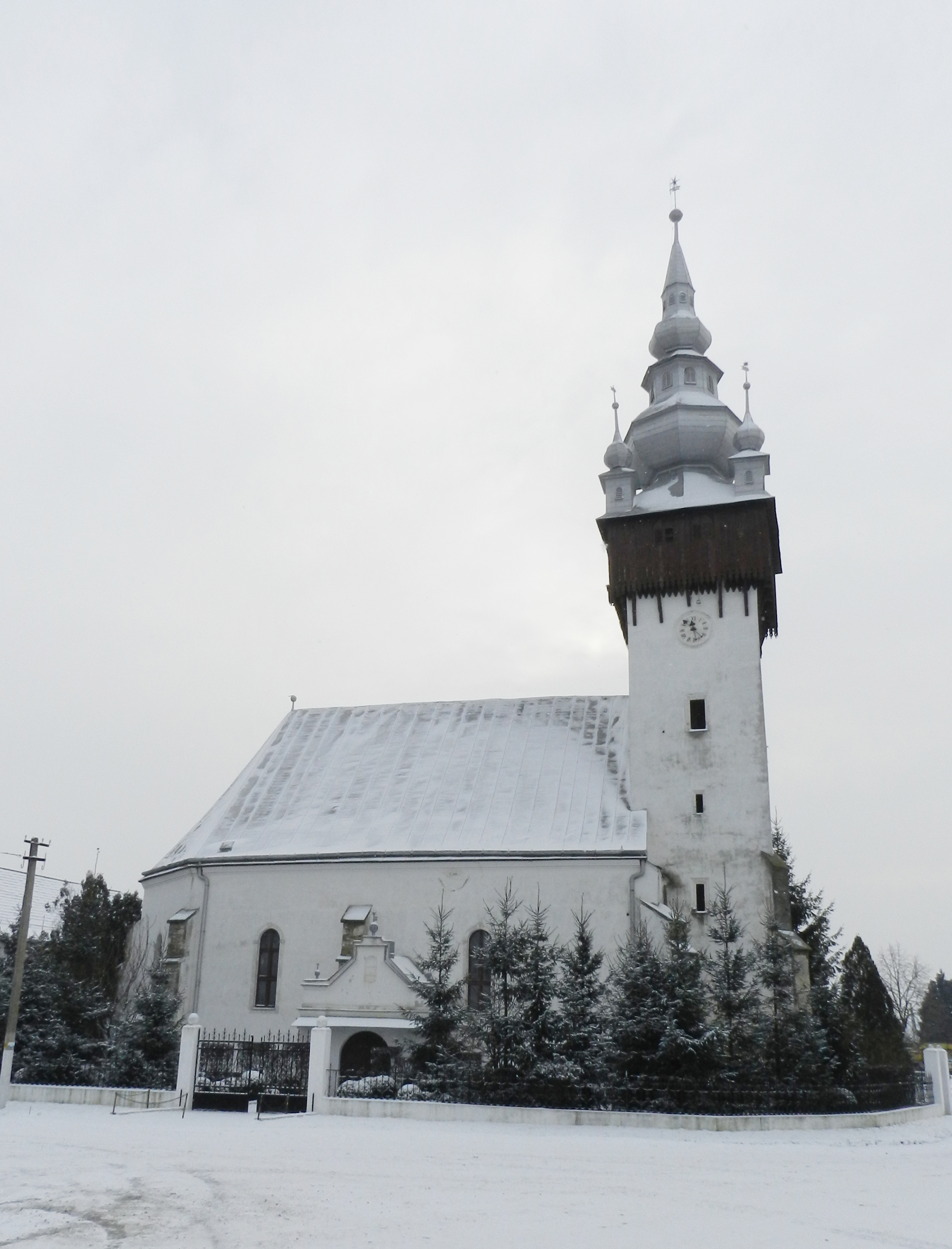 Реформатській храм, с. Вари